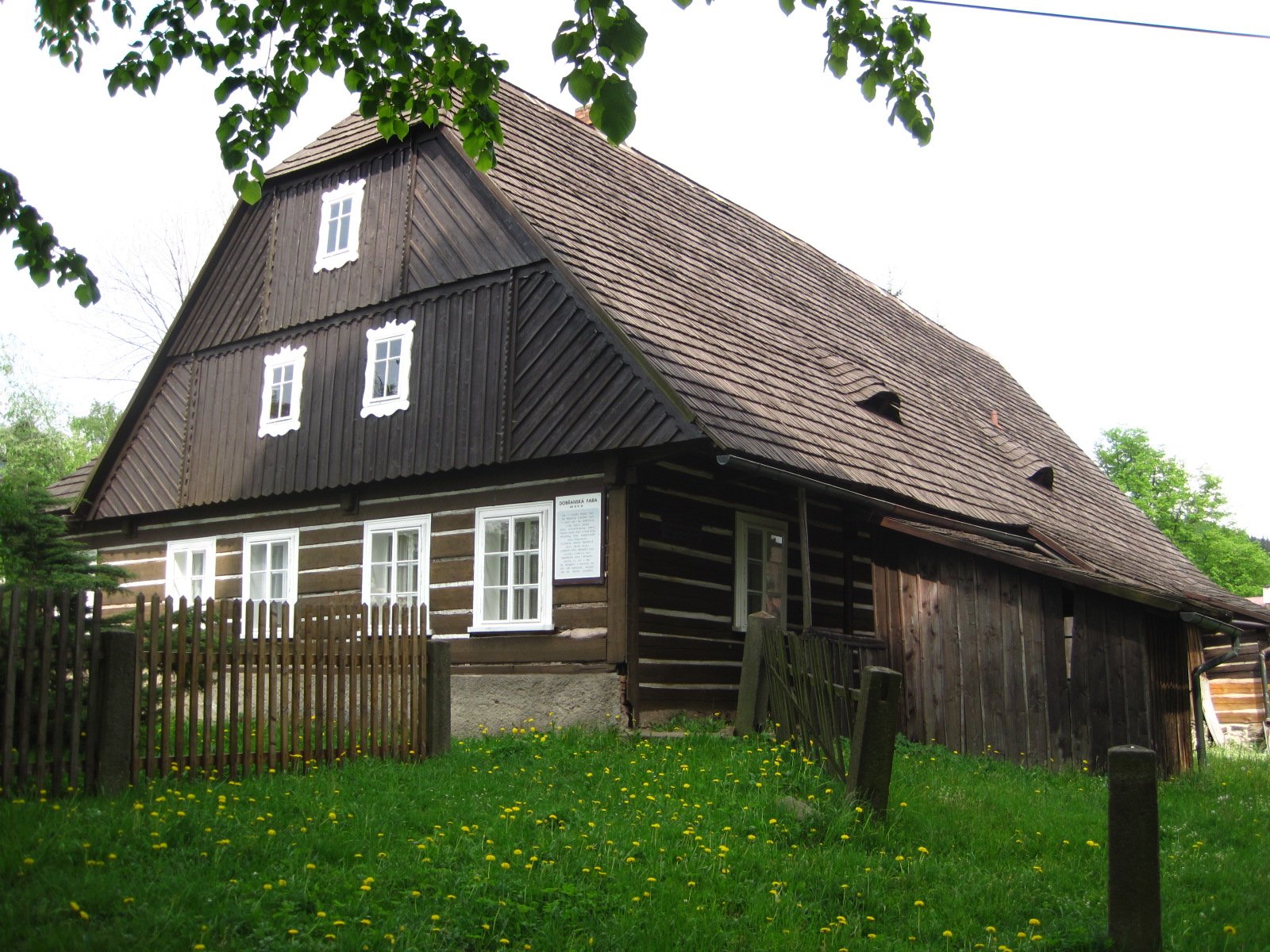 Fara, Dobřany 1, Dobřany (okres Rychnov nad Kněžnou).